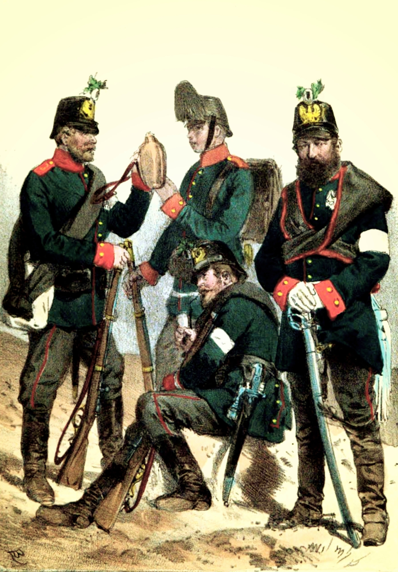 Zeitgenössische Darstellung, Brandenburger Jäger im Feldzug von 1864.